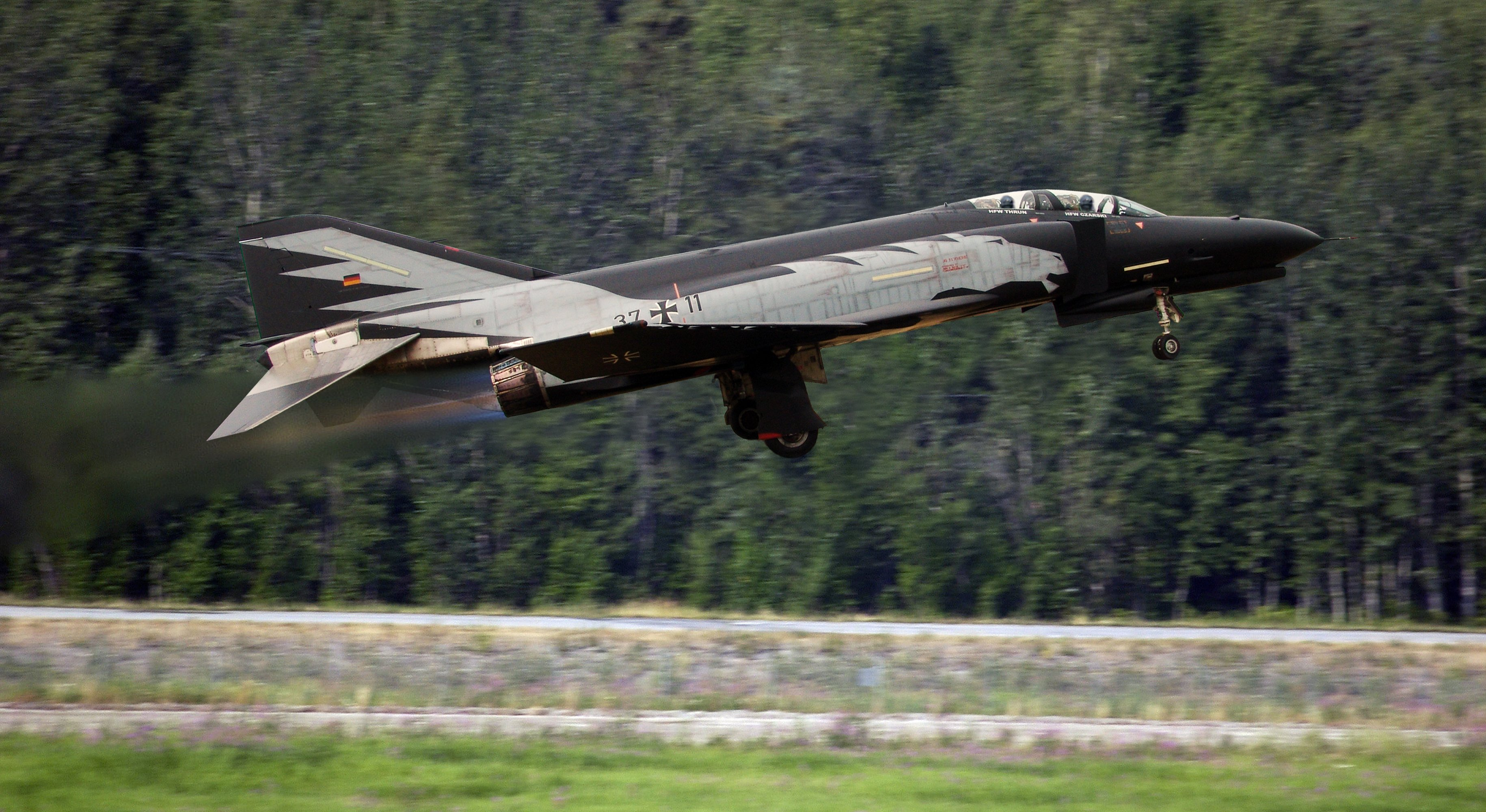 F-4F Phantom II "Black Beauty" des ehemaligen Jagdgeschwaders 72 "Westfalen" und späteren Fluglehrzentrum F4F nach dem letzten Flug der Einheit. Gesockelt auf dem Fliegerhorst Wittmund beim Jagdgeschwader 71 "Richthofen".